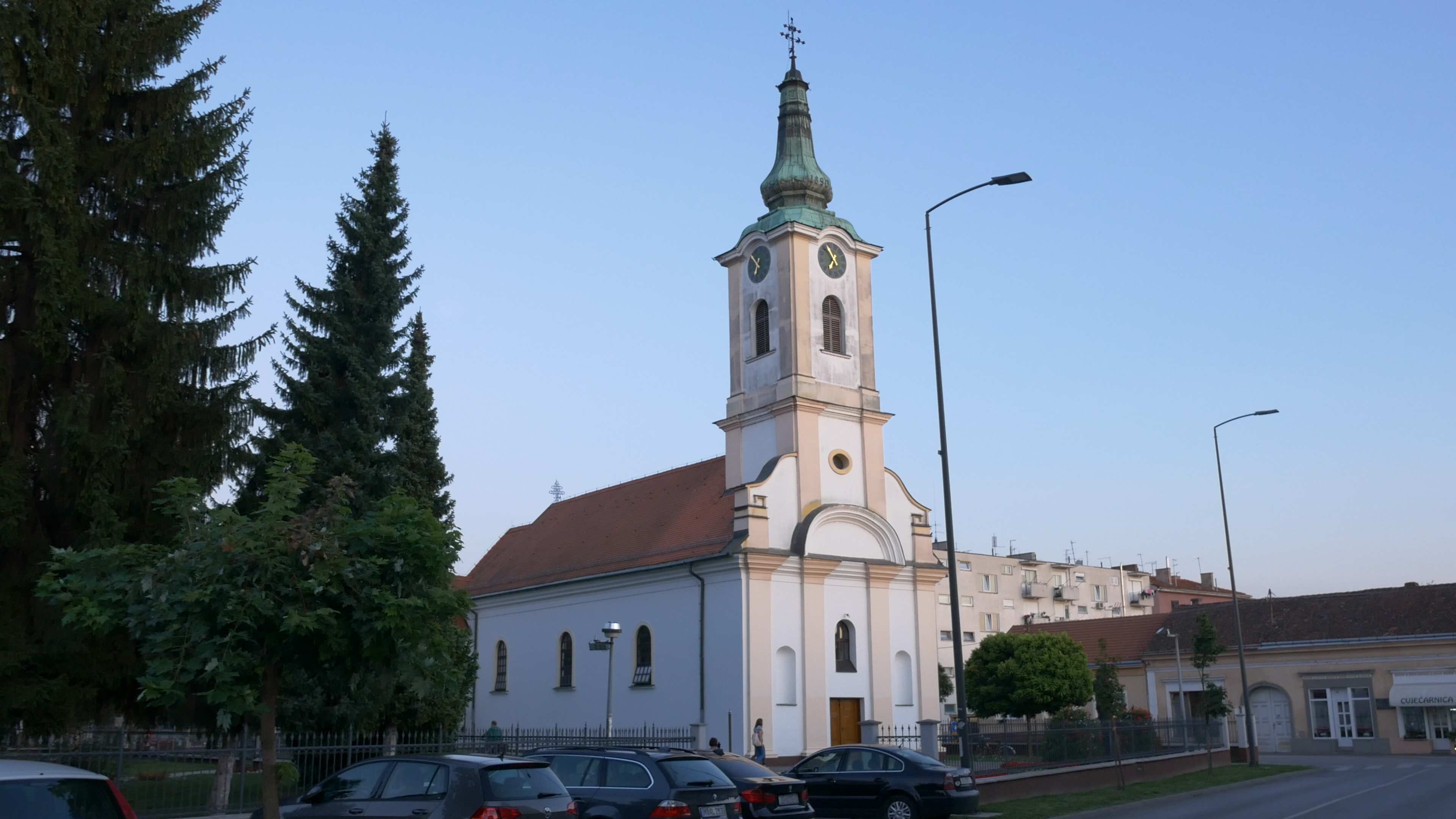 Župna crkva Gospe Brze Pomoći